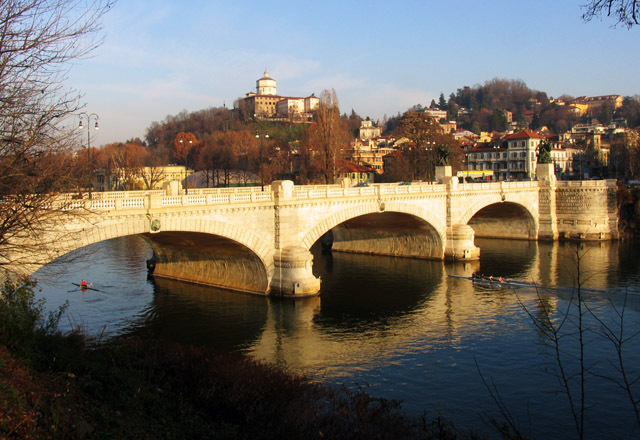 Ponte Umberto I- Torino 12/2006